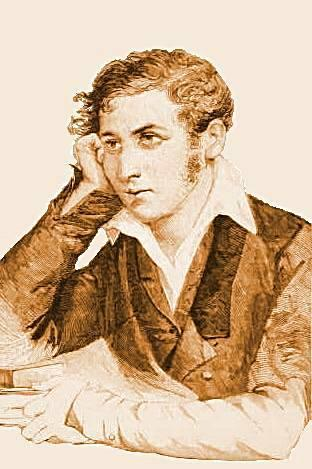 Ritratto giovanile di Carlo Cattaneo, xilografia, ridotta, rielaborata